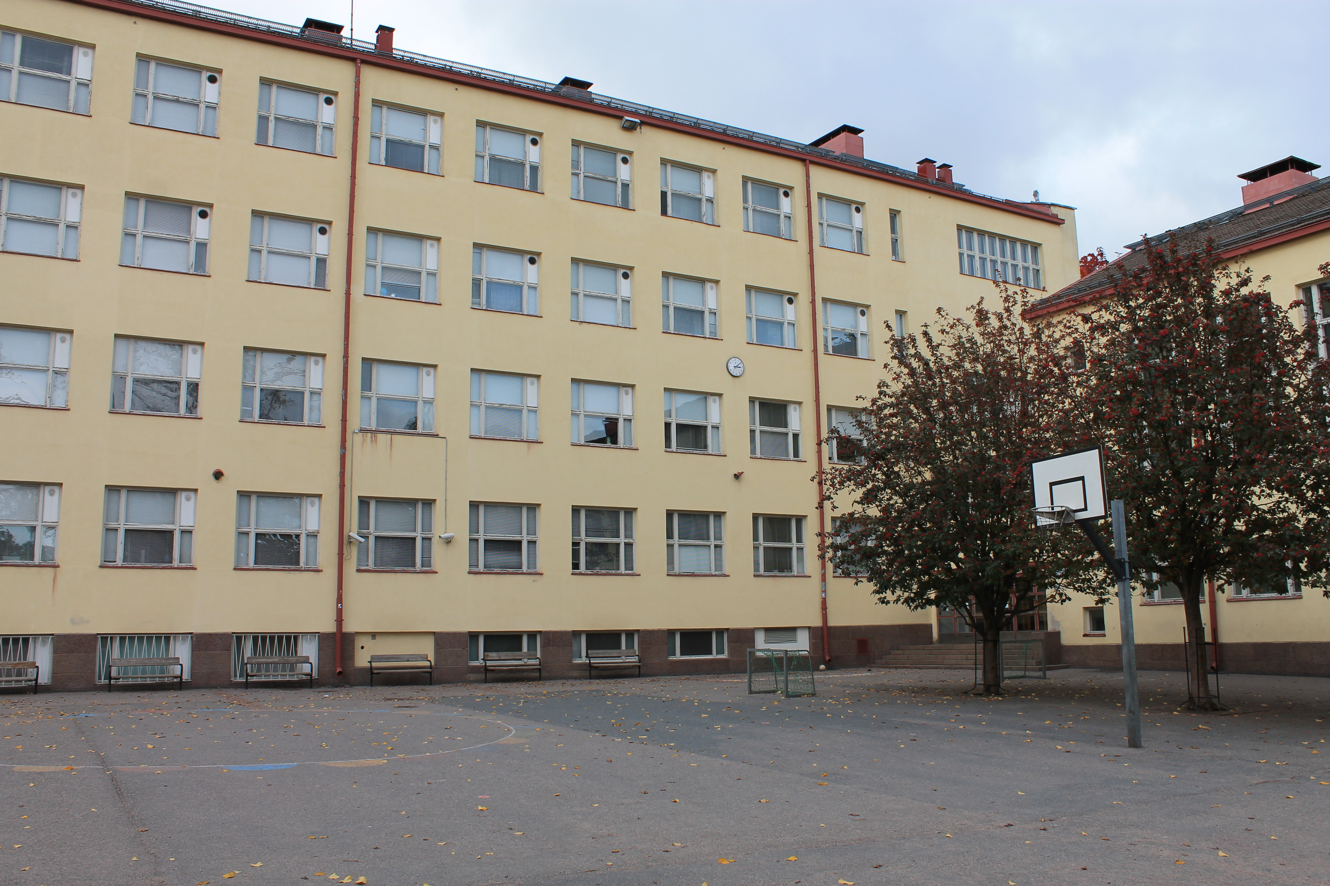 Käpylän peruskoulun Untamon rakennus.